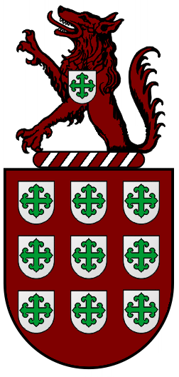 Armas da Família Moreira